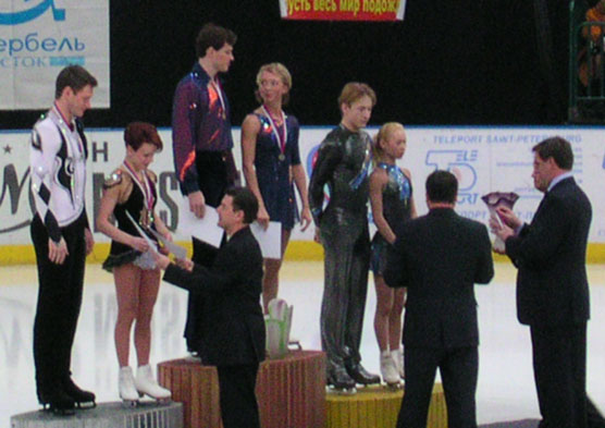 Siegerehrung Paare (Russische Meisterschaften 2004)